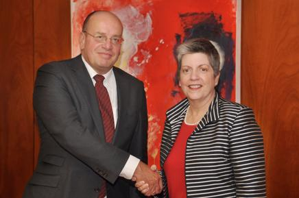 Janet Napolitano (Homeland) ontmoet staatssecretaris Fred Teeven van Veiligheid en Justitie tijdens haar werkbezoek aan Nederland in 2011